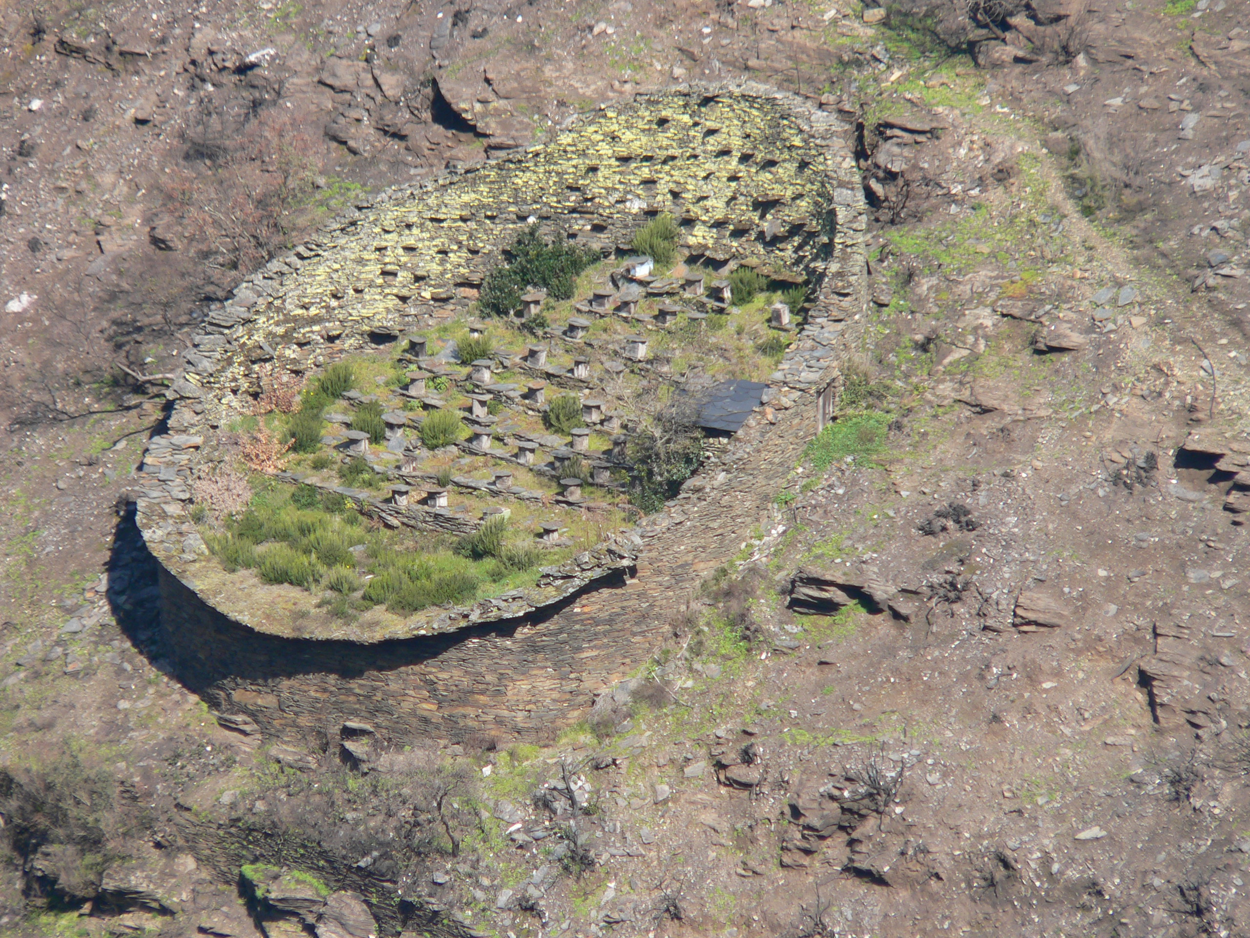 Protexendo a mel dos osos